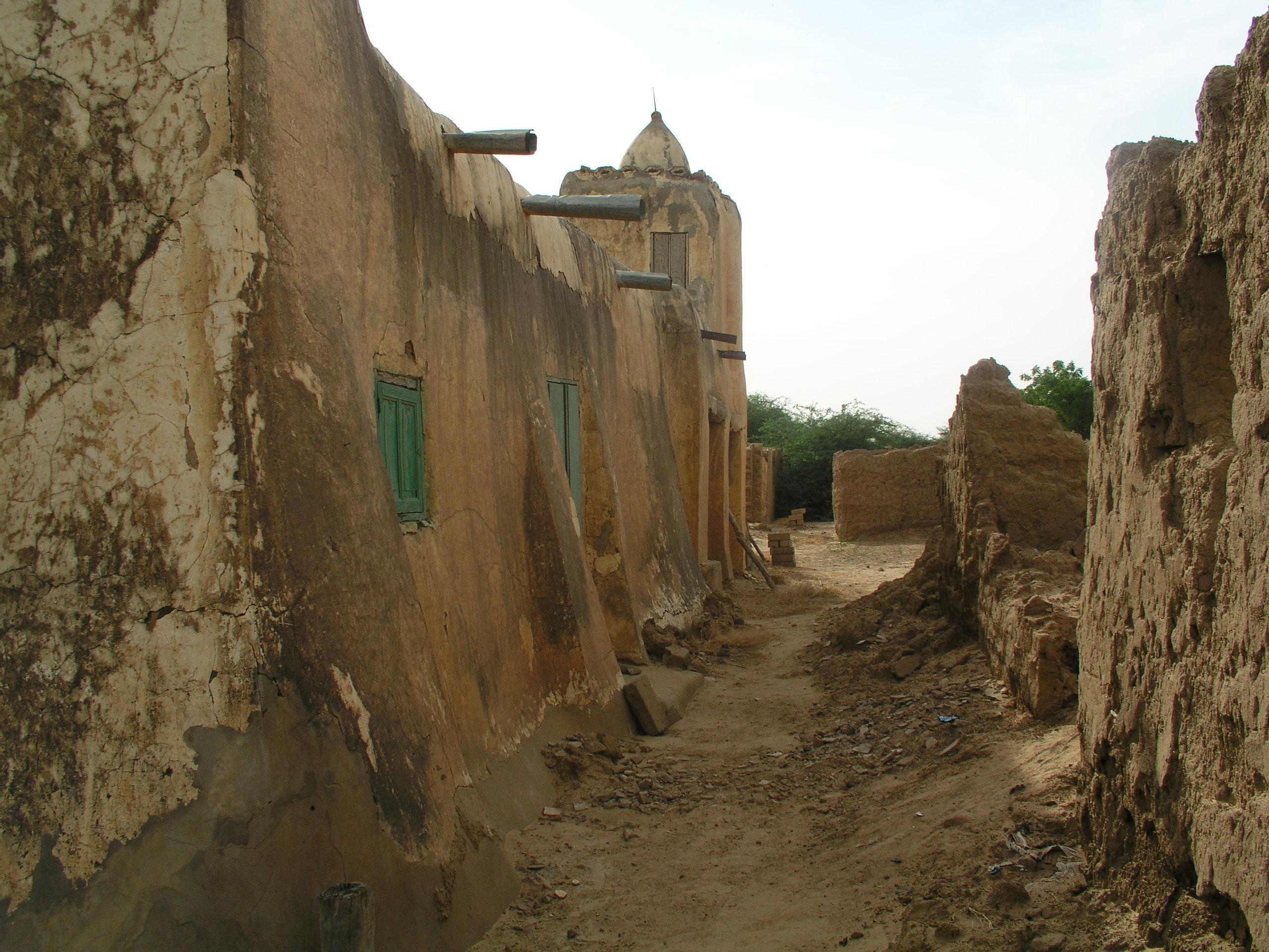 Rue de village et mosquée aux environs de Podor (nord du Sénégal)